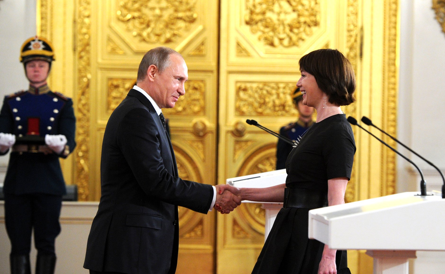 Вручение Государственных премий Российской Федерации за 2014 год. Государственная премия Российской Федерации в области литературы и искусства 2014 года присуждена Чулпан Хаматовой